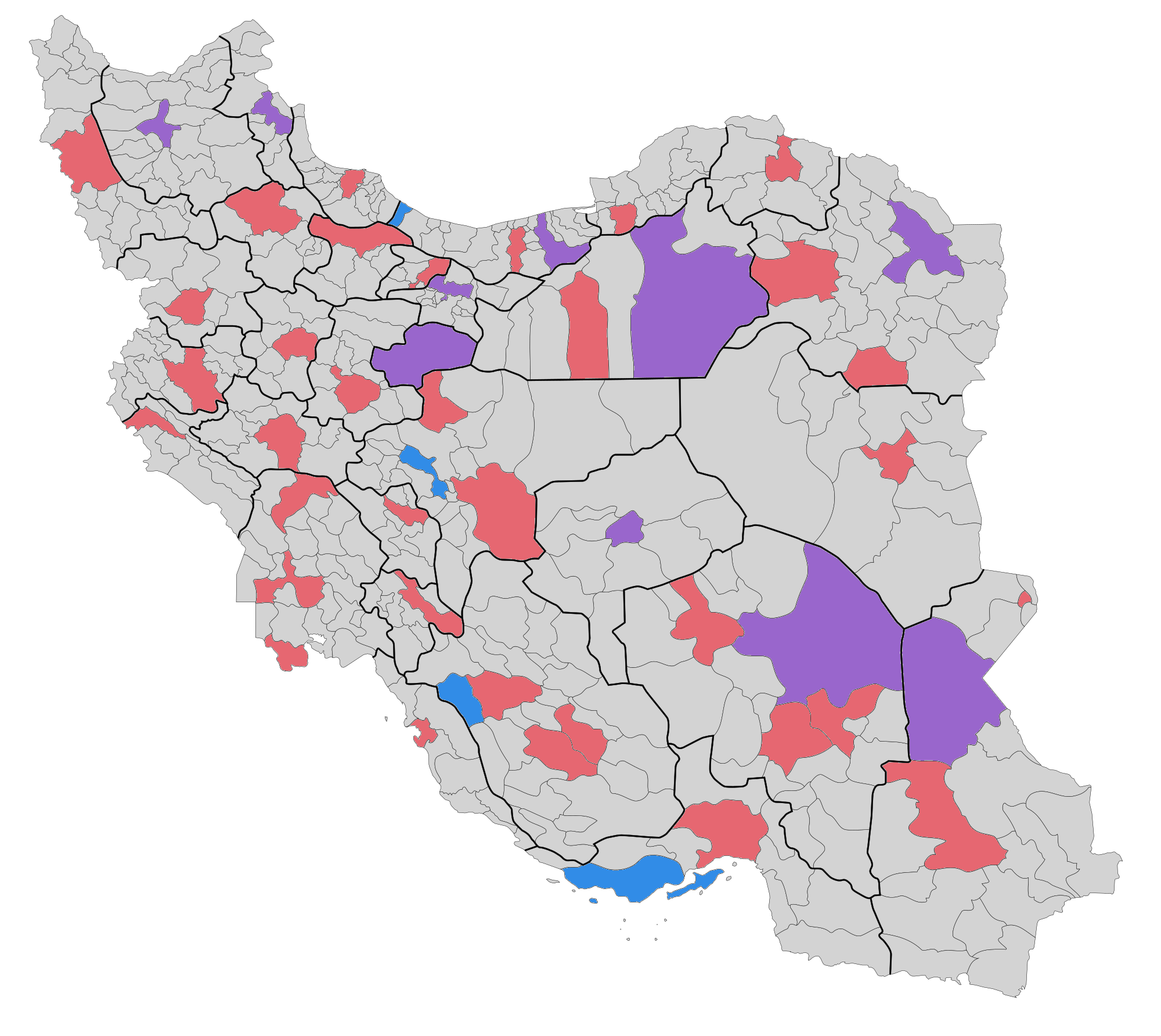 پراکندگی دانشکده های پزشکی در ایران. راهنما: دانشکده‌های پزشکی دولتی دانشکده‌های پزشکی آزاد هردو